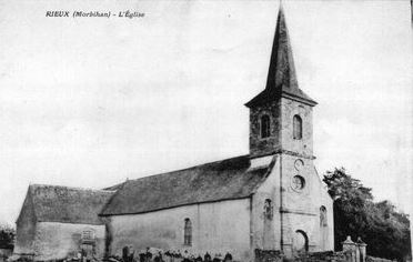 carte postale de l'église de Rieux avant 1945